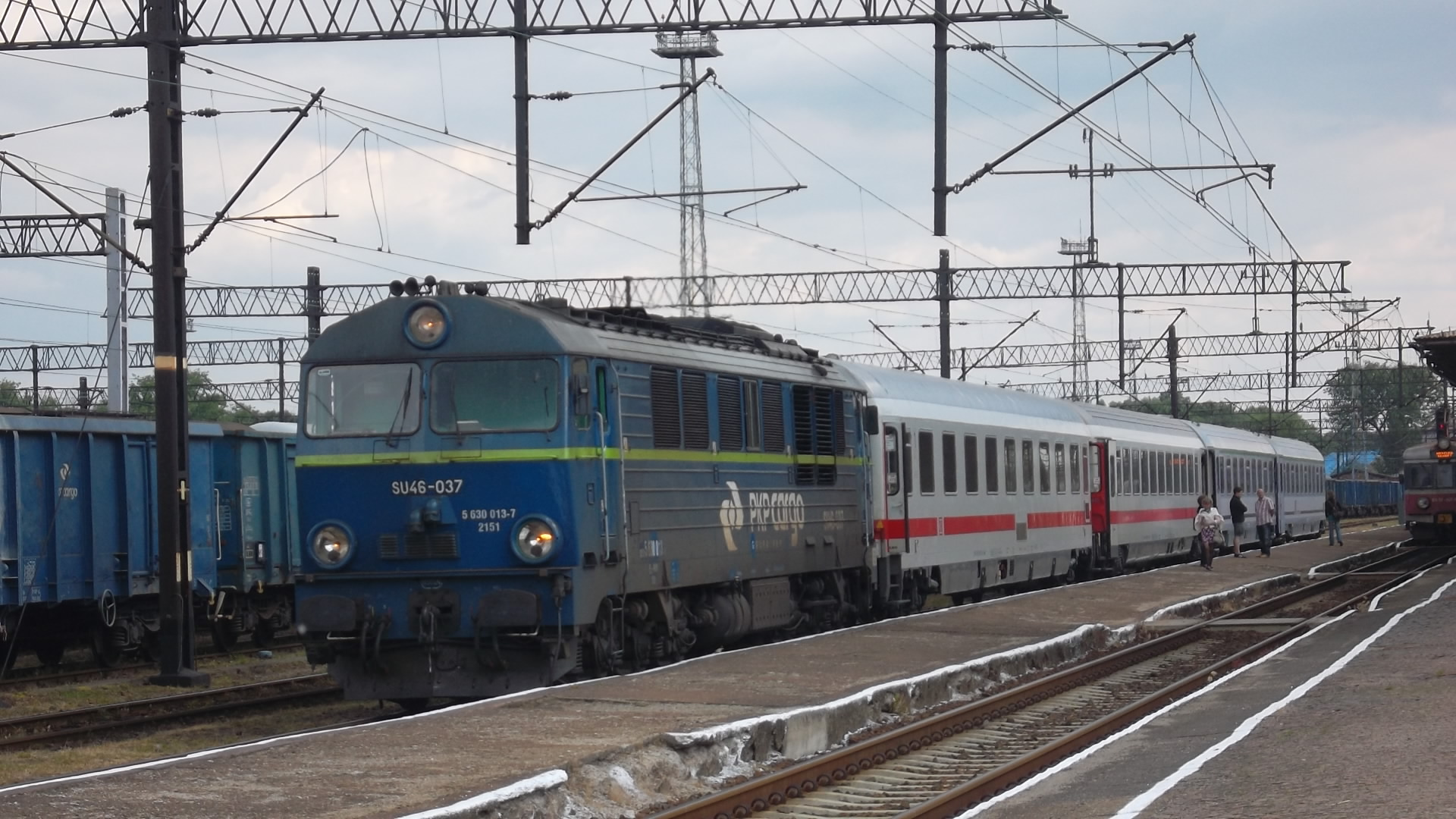 Lokomotywa SU46-037 (PKP Cargo, CT Wrocław) podczepia się podczas pomiany lokomotyw pod skład EuroCity "Wawel" w Węglińcu